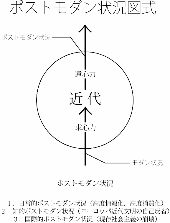 こういう図式が基本的な図式。